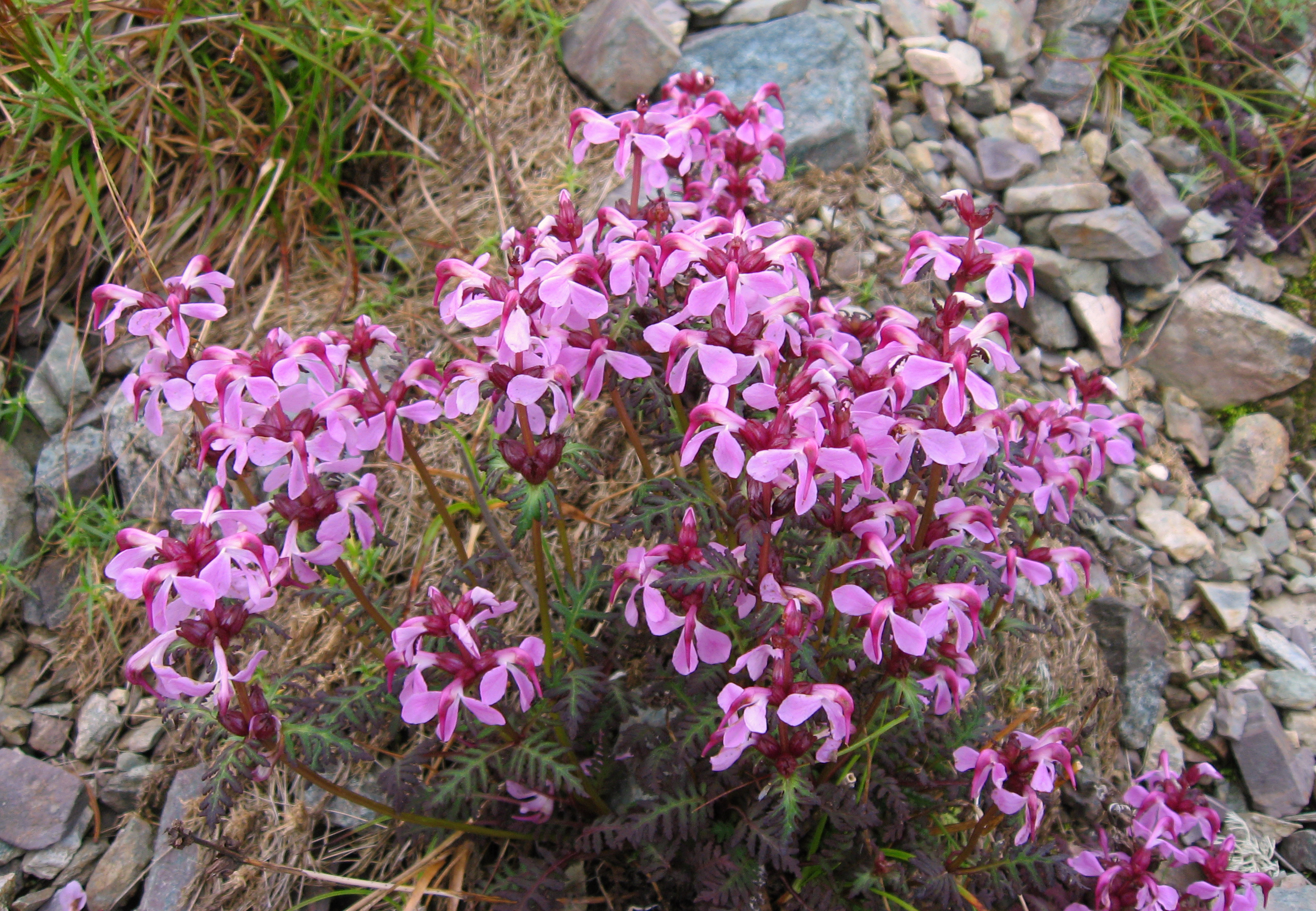 ヨツバシオガマ (学名：Pedicularis chamissonis var. japonica)